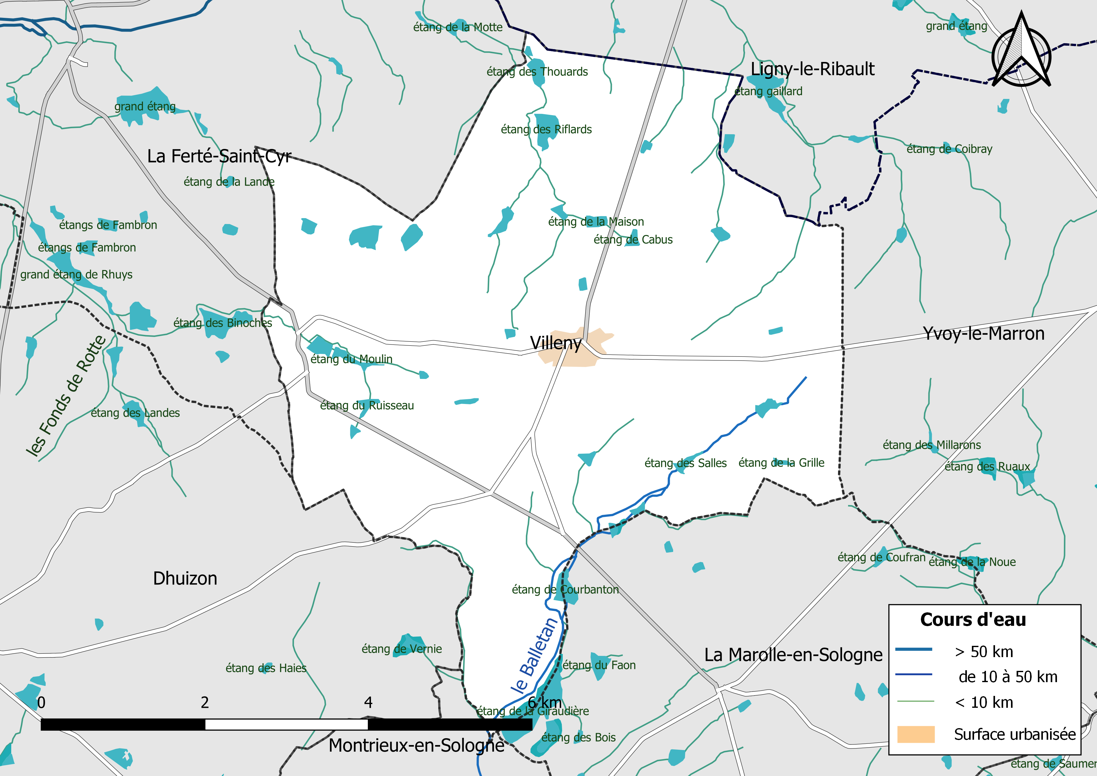 Carte du réseau hydrographique de la commune de Villeny (Loir-et-Cher, France).